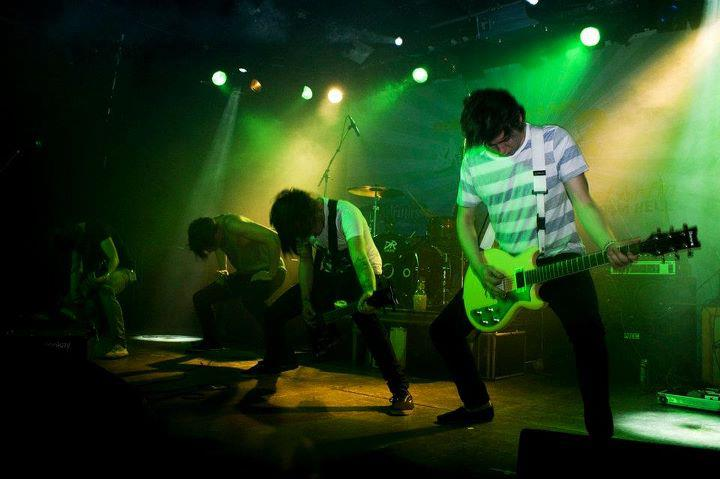 Annisokay live 2012